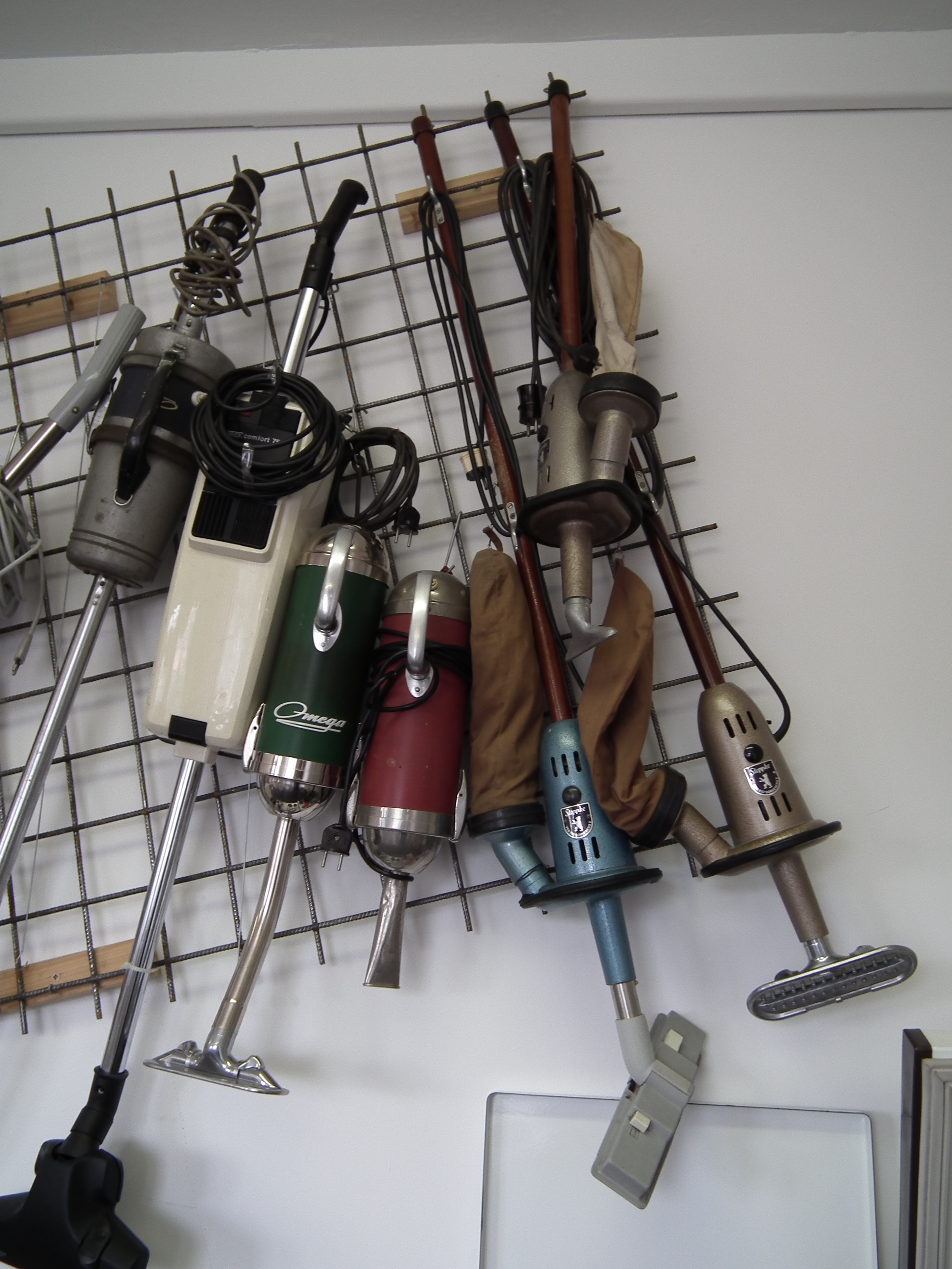 DDR Museum Zeitreise Radebeul, Staubsauger vom VEB EIO Sonnenberg (die drei rechten Geräte), Fotografiert mit Genehmigung der Museumsleitung